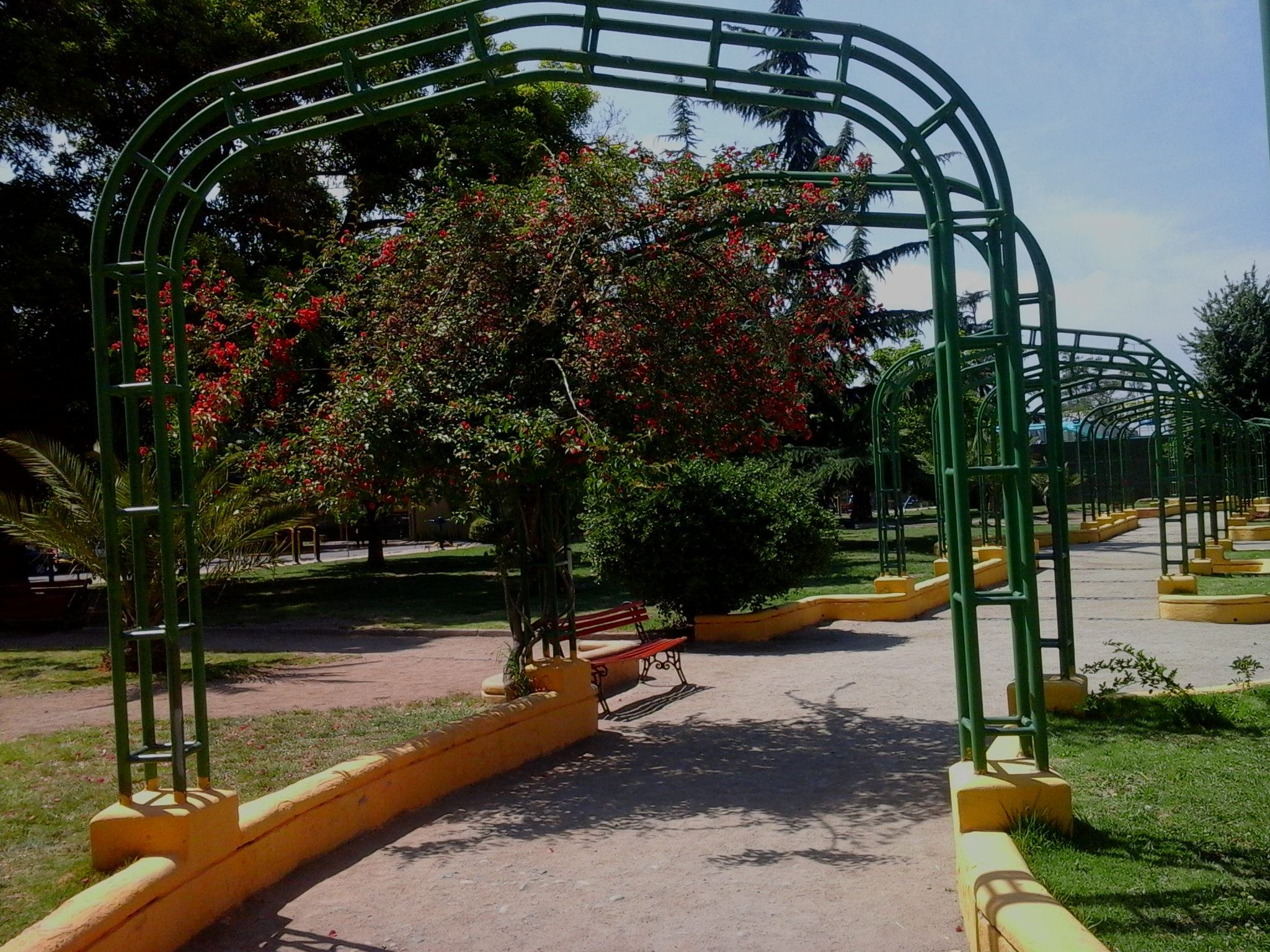 Plaza San Esteban